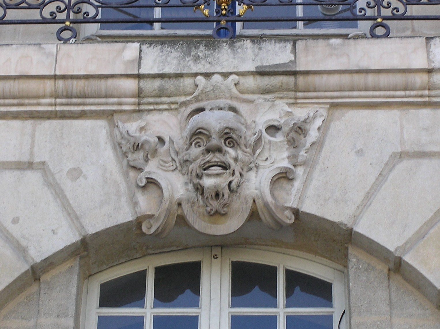 Mascaron en façade d'un immeuble de la place de la Bourse